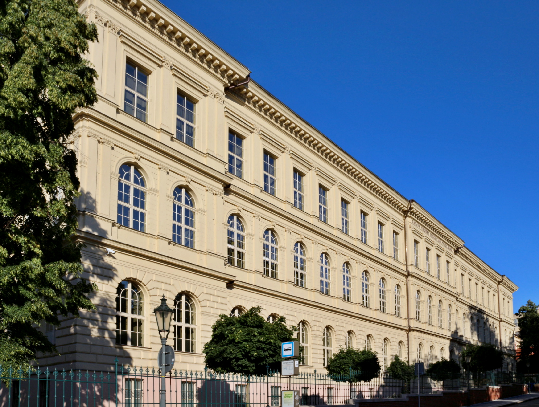 Budova děkanátu 1. Lékařské fakulty UK, ulice Ke Karlovu